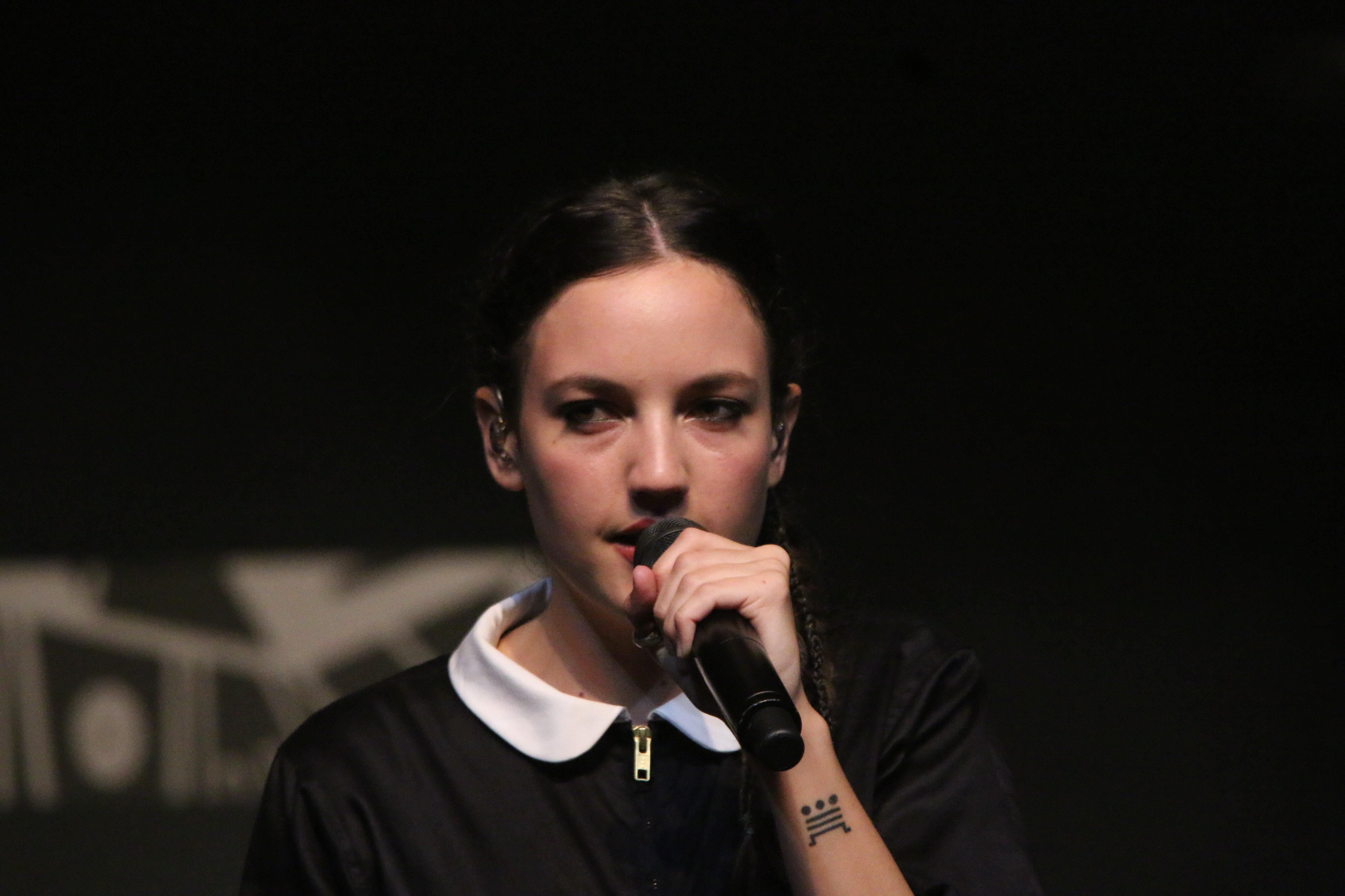 Jain - Paléo 2016